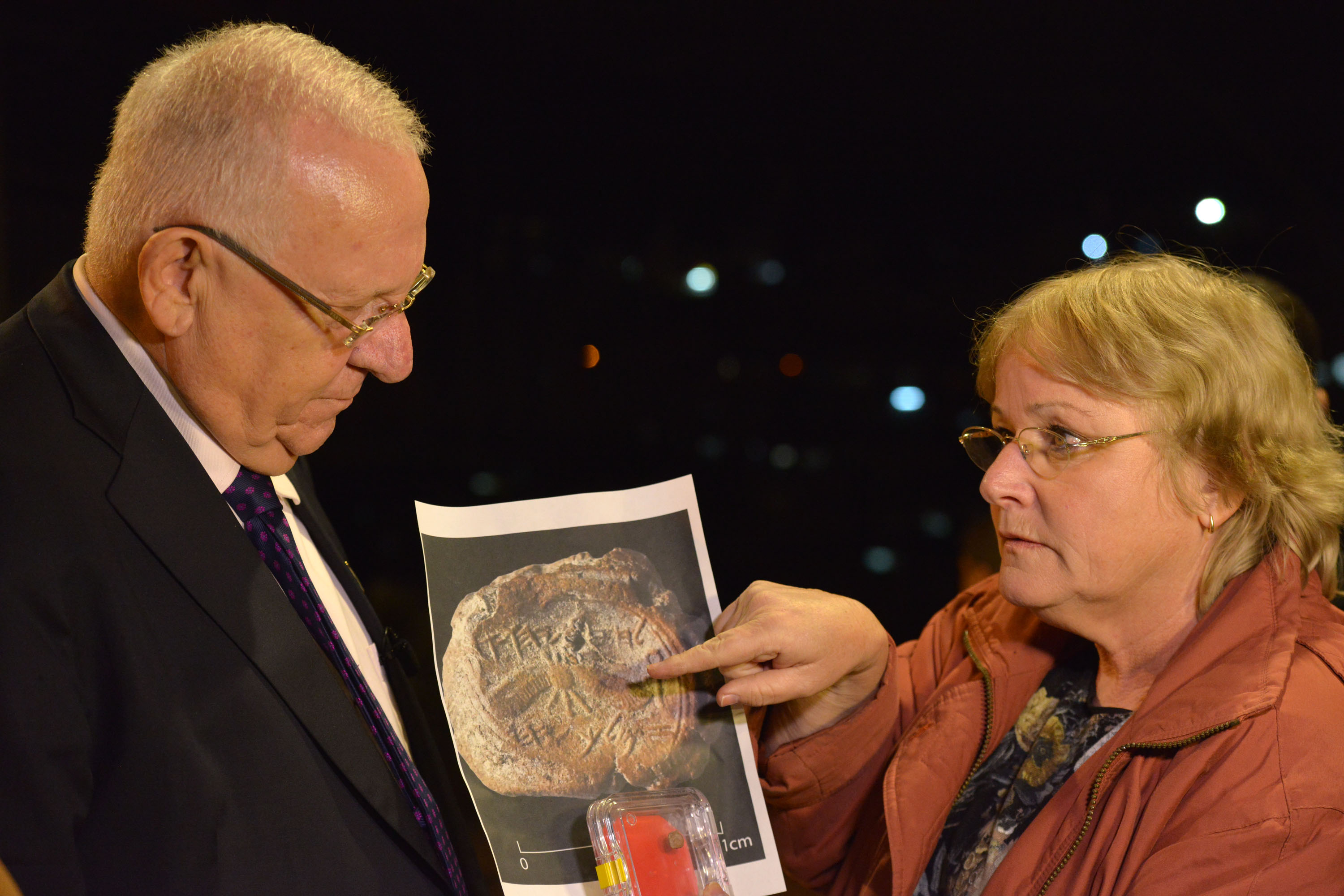 נשיא מדית ישראל ראובן רובי ריבלין עם ד"ר אילת מזר בעיר דוד סמוך לעיר העתיקה בירושלים. ד"ר מזר הציגה לנשיא המדינה ממצא ארכיאולוגי, טביעת חותם של המלך חזקיהו שהתגלתה בחפירות בירושלים